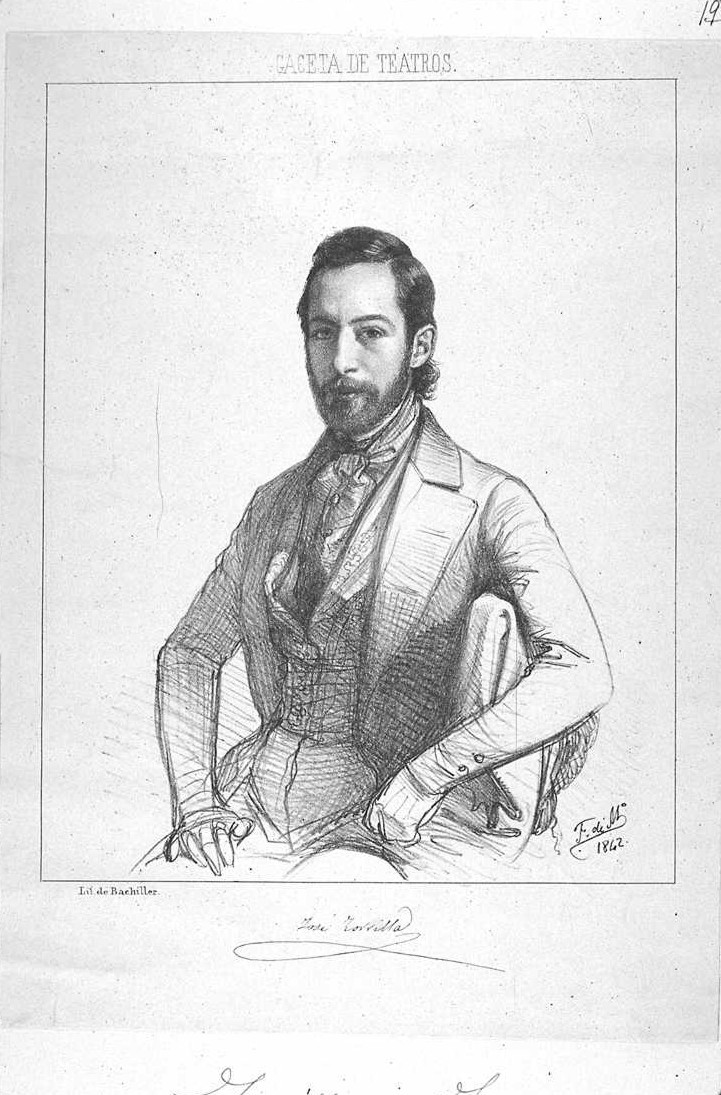 Retrato de José Zorrilla y Moral, poeta y dramaturgo español, obra de Federico de Madrazo y Kuntz.